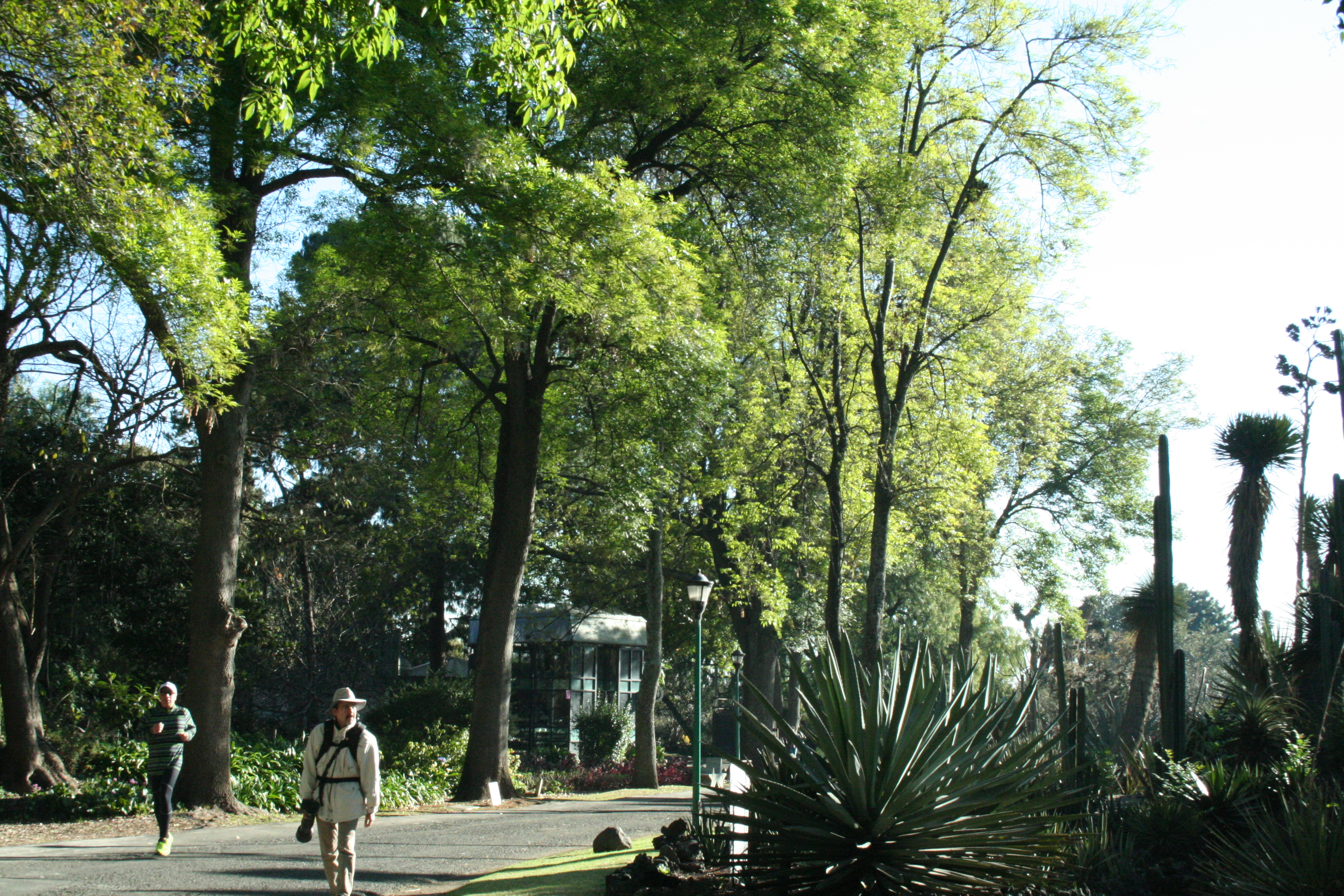 El jardín Botánico del Instituto de Biología es el segundo más antiguo a nivel nacional.